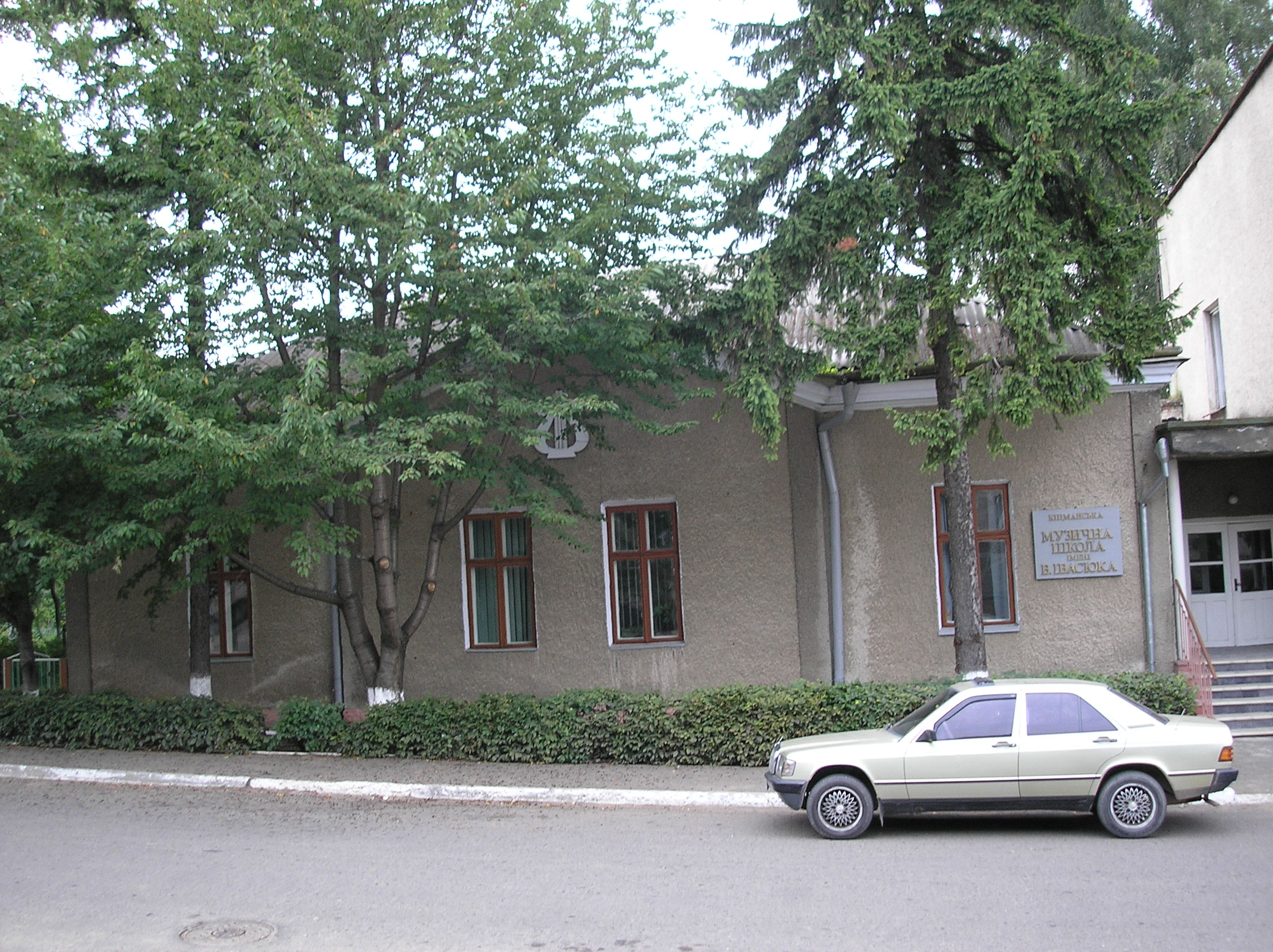 Кіцманська музична школа імені Володимира Івасюка